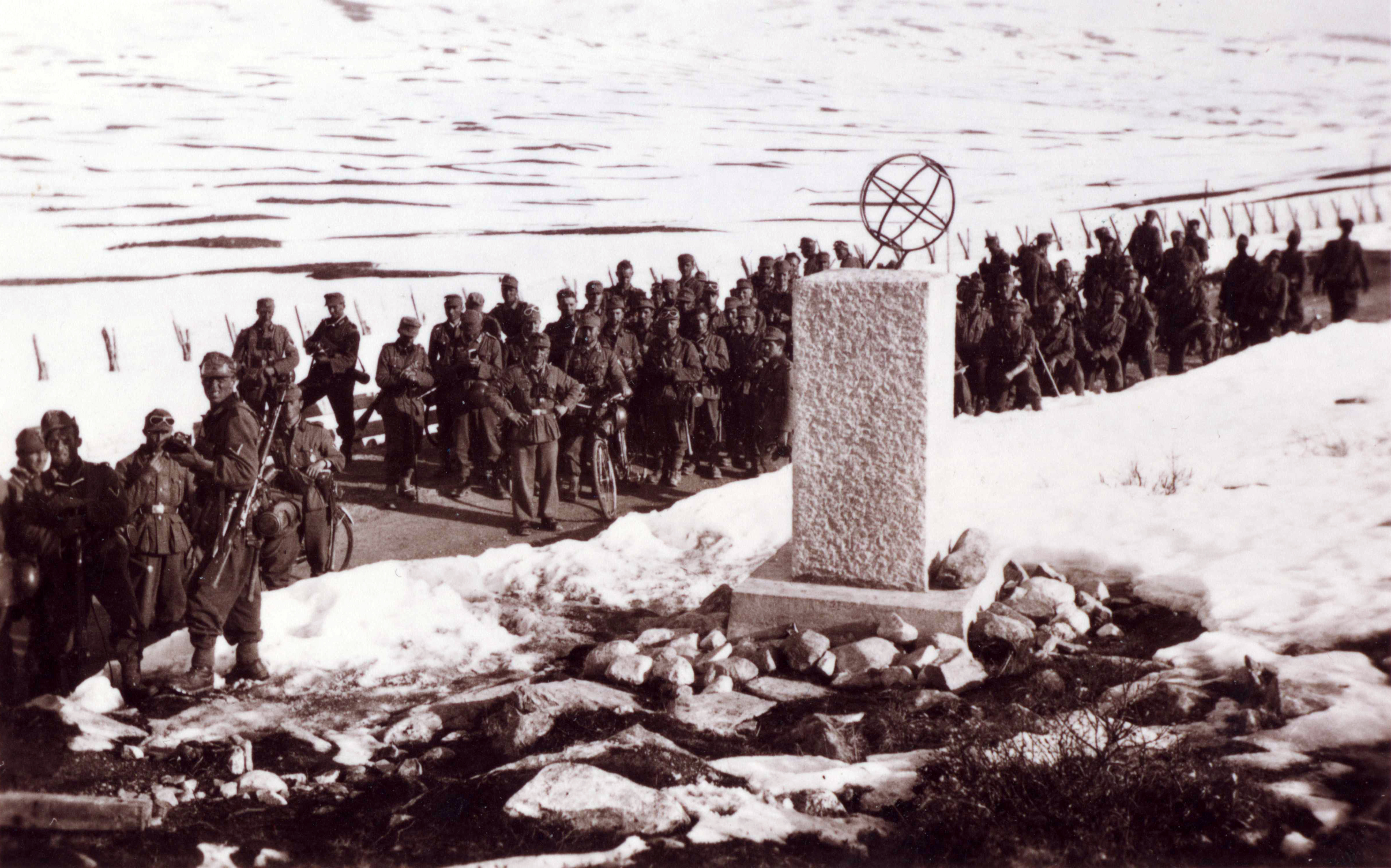 Det 7.Kompani har nådd Polarsirkelen Tittel / Title: Rudi Margreiters tropp har nådd polarsirkelen. Dato / Date: 23. mai 1940 Fotograf / Photographer: Rudi Margreiter Sted / Place: Polarsirkelen, Saltfjellet, Nordland, Norge Eier / Owner Institution: Arkiv i Nordland Lenke / Link: Arkiv i Nordland Arkivreferanse /Archive reference: AIN.NA143.0063 Fra Dag Skogheims Privatarkiv Tekst bak på bildet: Die 7. Kompanie am Polarkreis, in der mitte mit angespreizten armen feldwebel Artmann, führer meines 2. zuges. Die weltkugel hat hier noch nicht den hakenkreuzwimpel! Hakekorset har enda ikke blitt festet på Polarsirkelmonumentet.